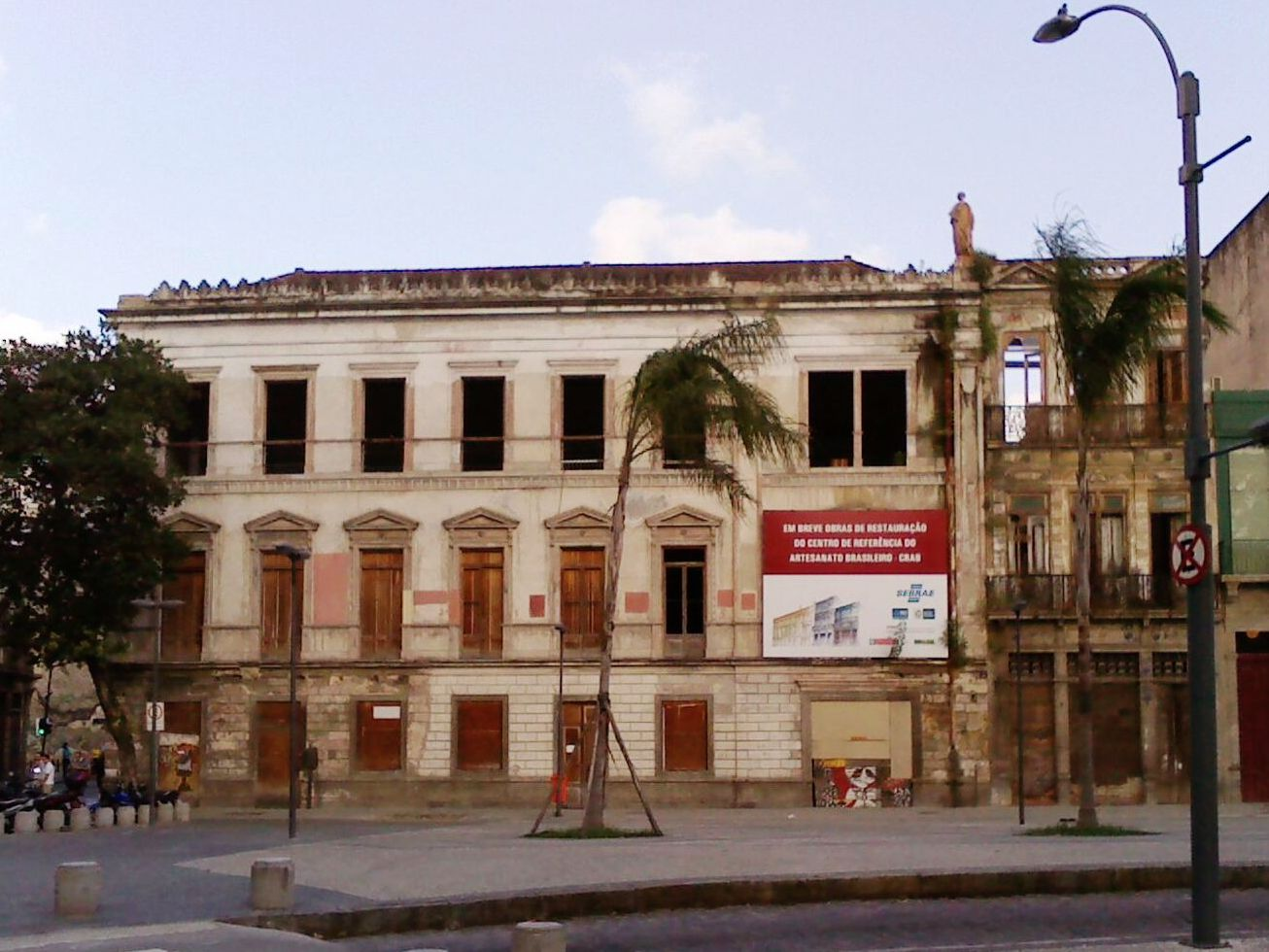 Solar do Visconde do Rio Seco (ruínas), praça Tiradentes, centro da cidade do Rio de Janeiro, estado do Rio de Janeiro, Brasil.